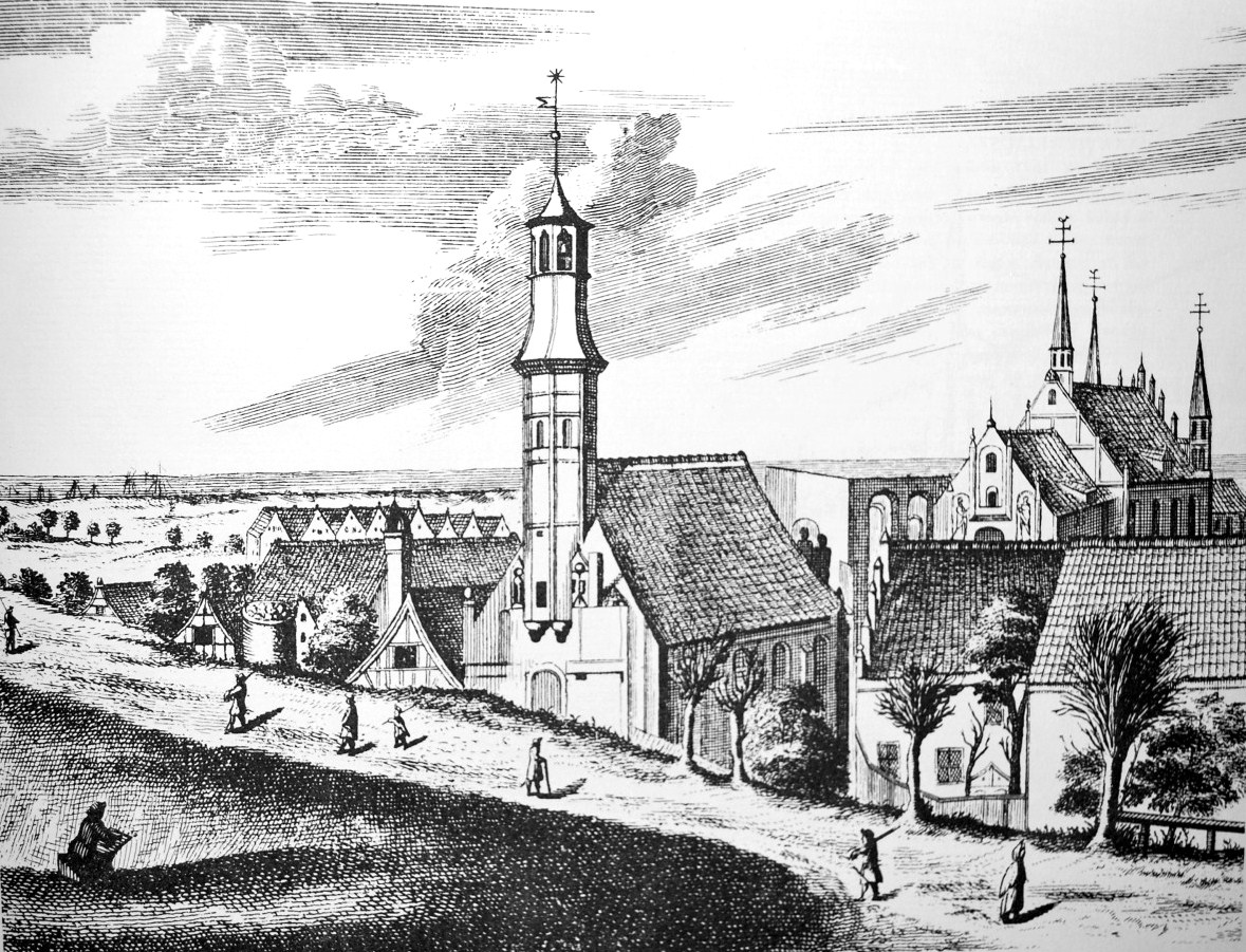 Gdańsk Stare Miasto, kościoły św. Elżbiety i św. Józefa.